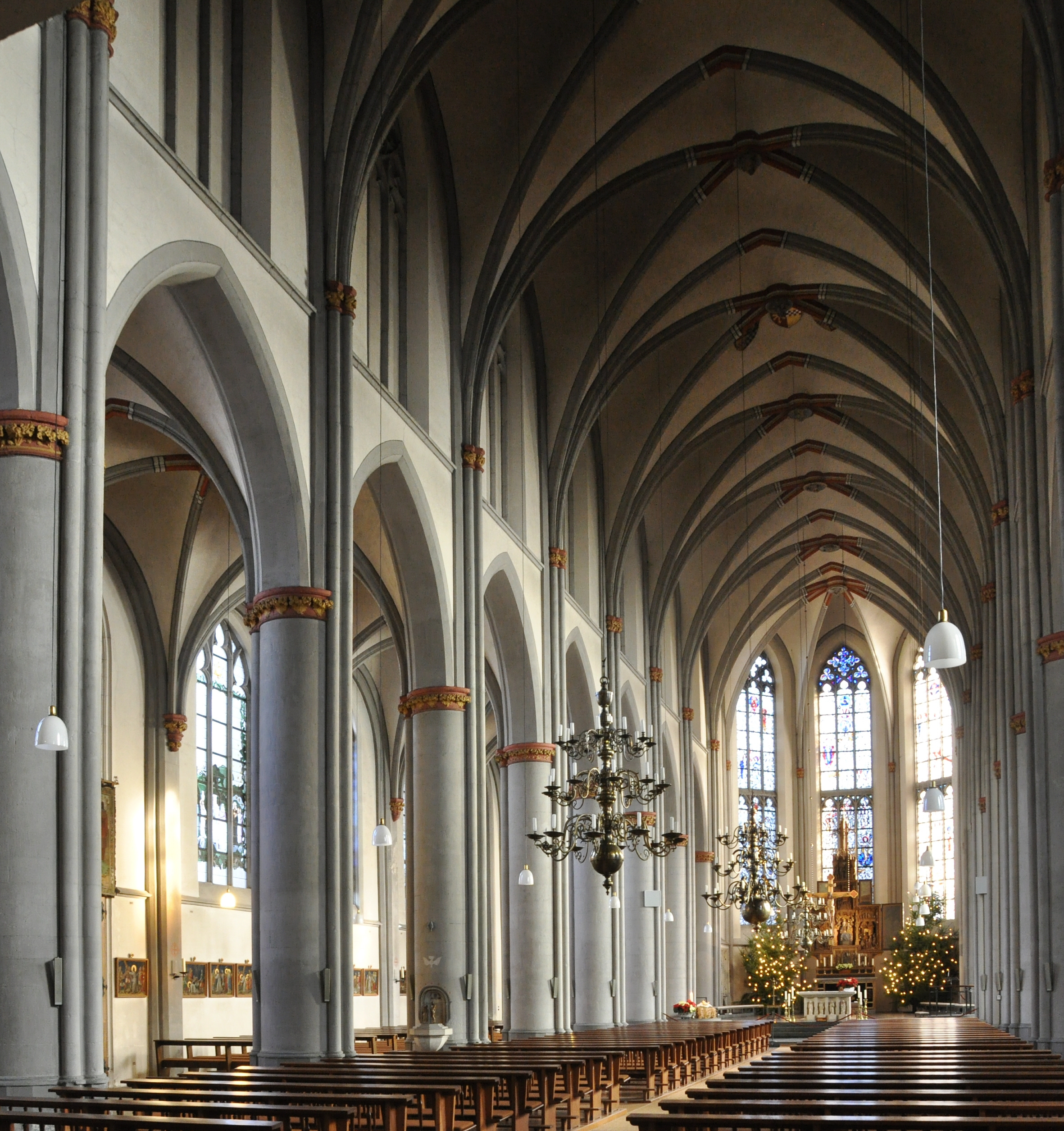 Mittelschiff nach Nordosten (Dezember, morgens) This is a photograph of an architectural monument.